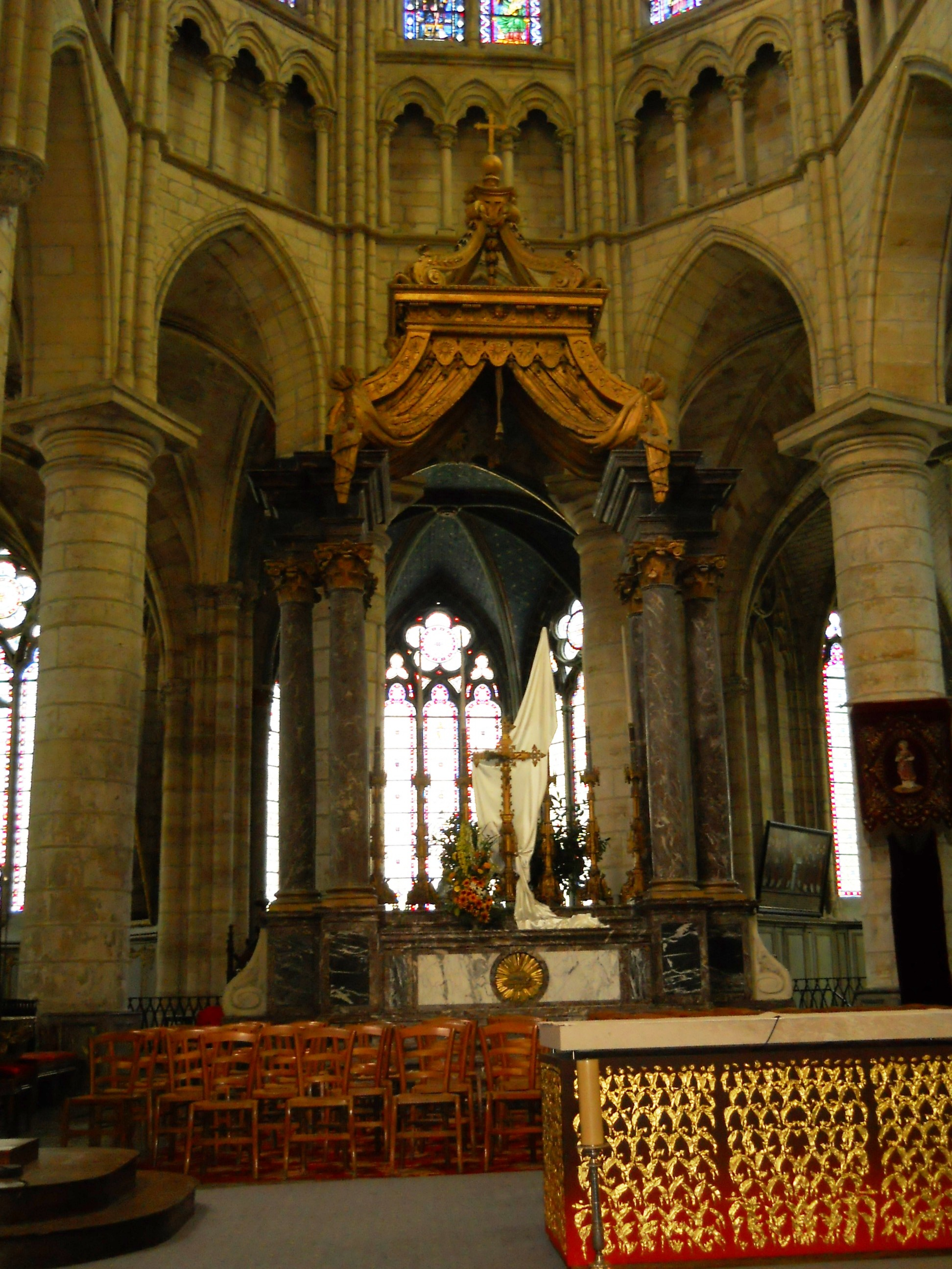 Châlons-en-Champagne, Kathedrale St-Etienne, Chorraum mit Hauptaltar des 17. Jahrhunderts und Volksaltar von 2009